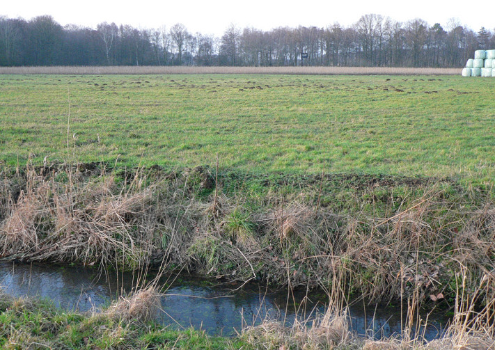 Wiese und Graben im Feuchtgebiet Sohrwiesen angrenzend an den Hämeler Wald